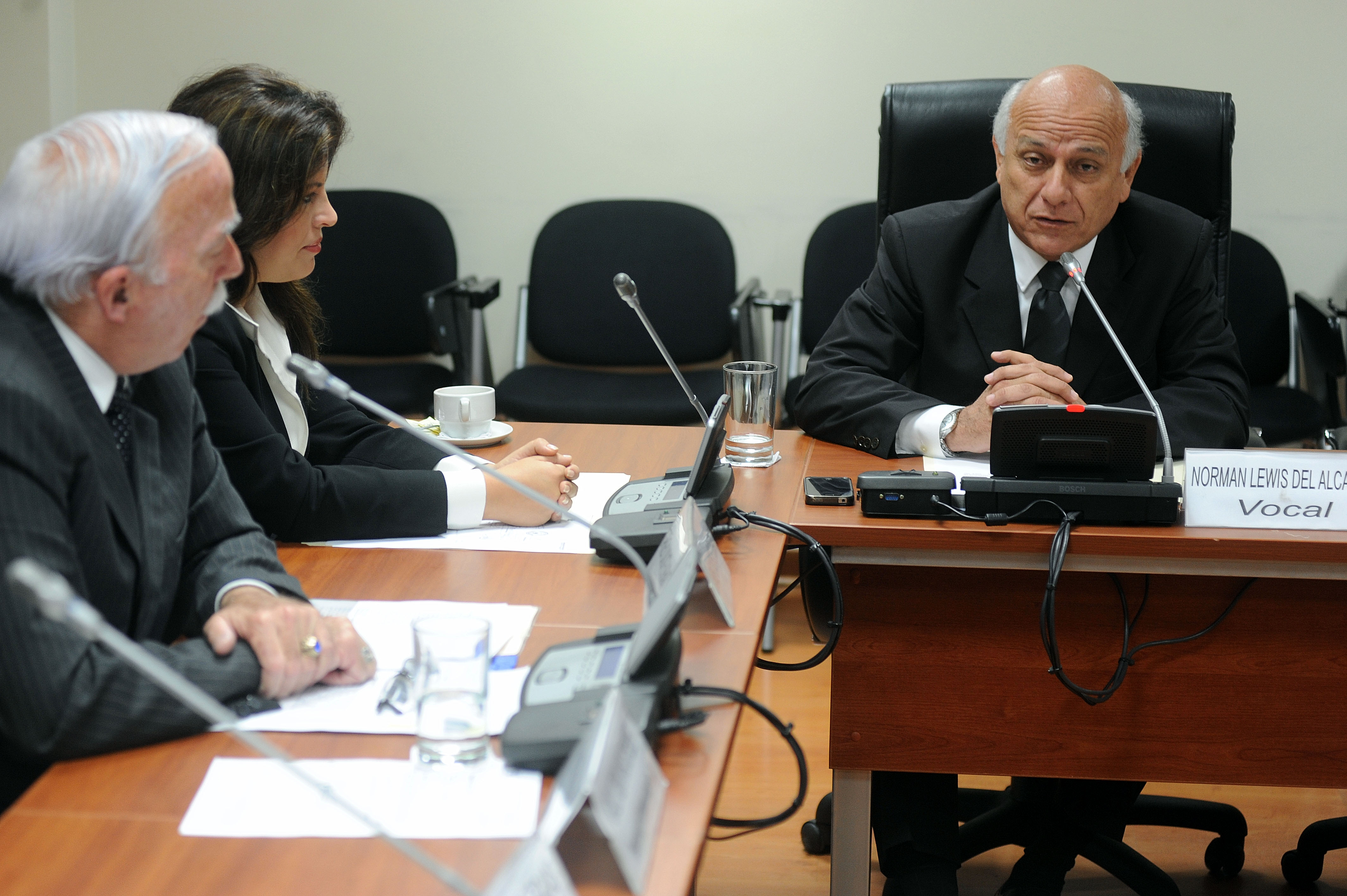 Fabio Vio Ugarte, embajador de Chile en Perú